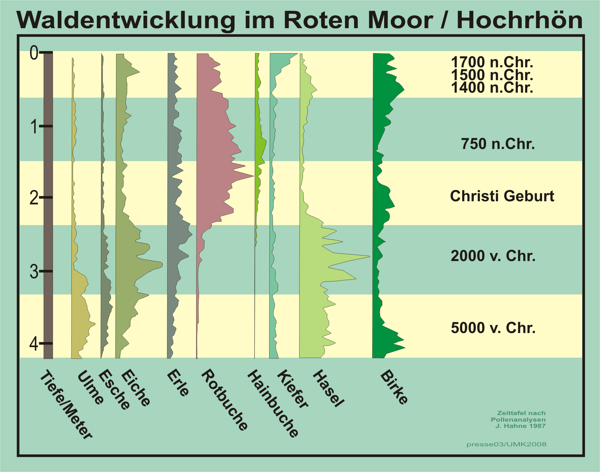 Waldentwicklung im Roten Moor, Hochrhön